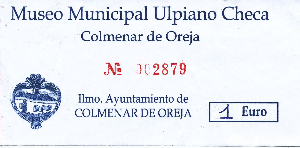 Entrada al Museo de Ulpiano Checa, Colmenar de Oreja, Comunidad de Madrid, España.